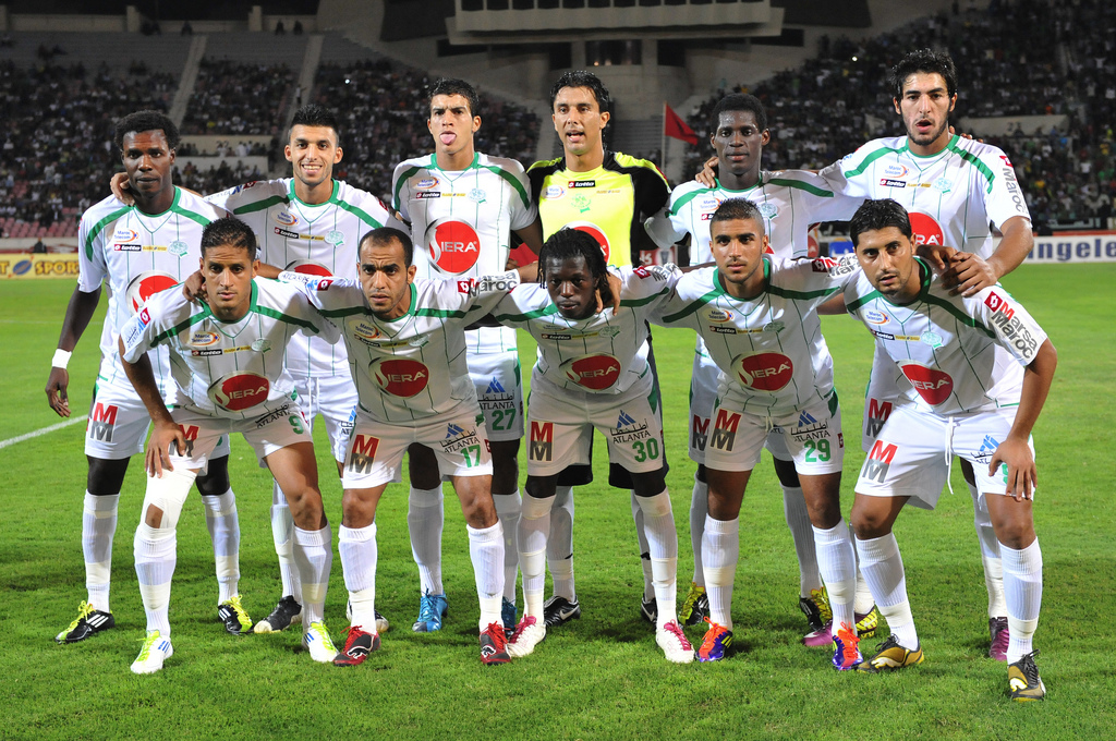 Équipe du Raja de Casablanca saison 2011-2012